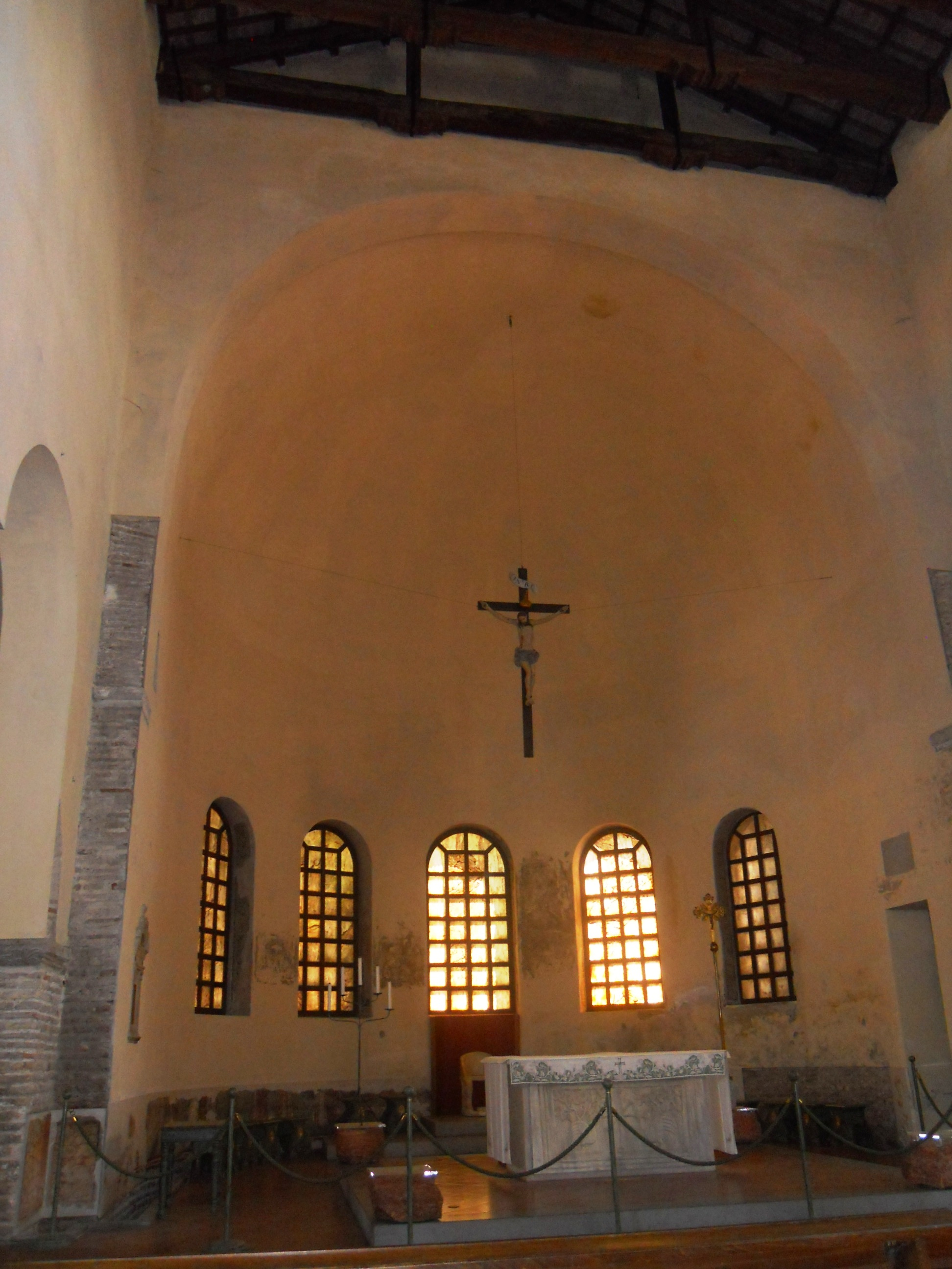 L'interno dell'abside paleocristiana della Basilica di Sant'Agata Maggiore in Ravenna, con l'altare, la cattedra e le tracce degli affreschi rinascimentali.